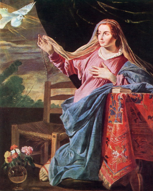 detail